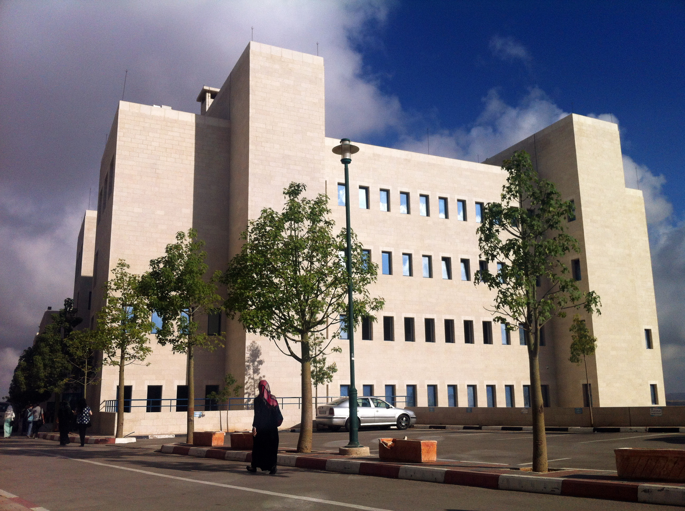 أحد المباني في جامعة النجاح الوطنية وهي جامعة فلسطينية في مدينة نابلس ولها فرع في مدينة طولكرم، تعد أحد أكبر الجامعات الفلسطينية من حيث عدد الطلاب.